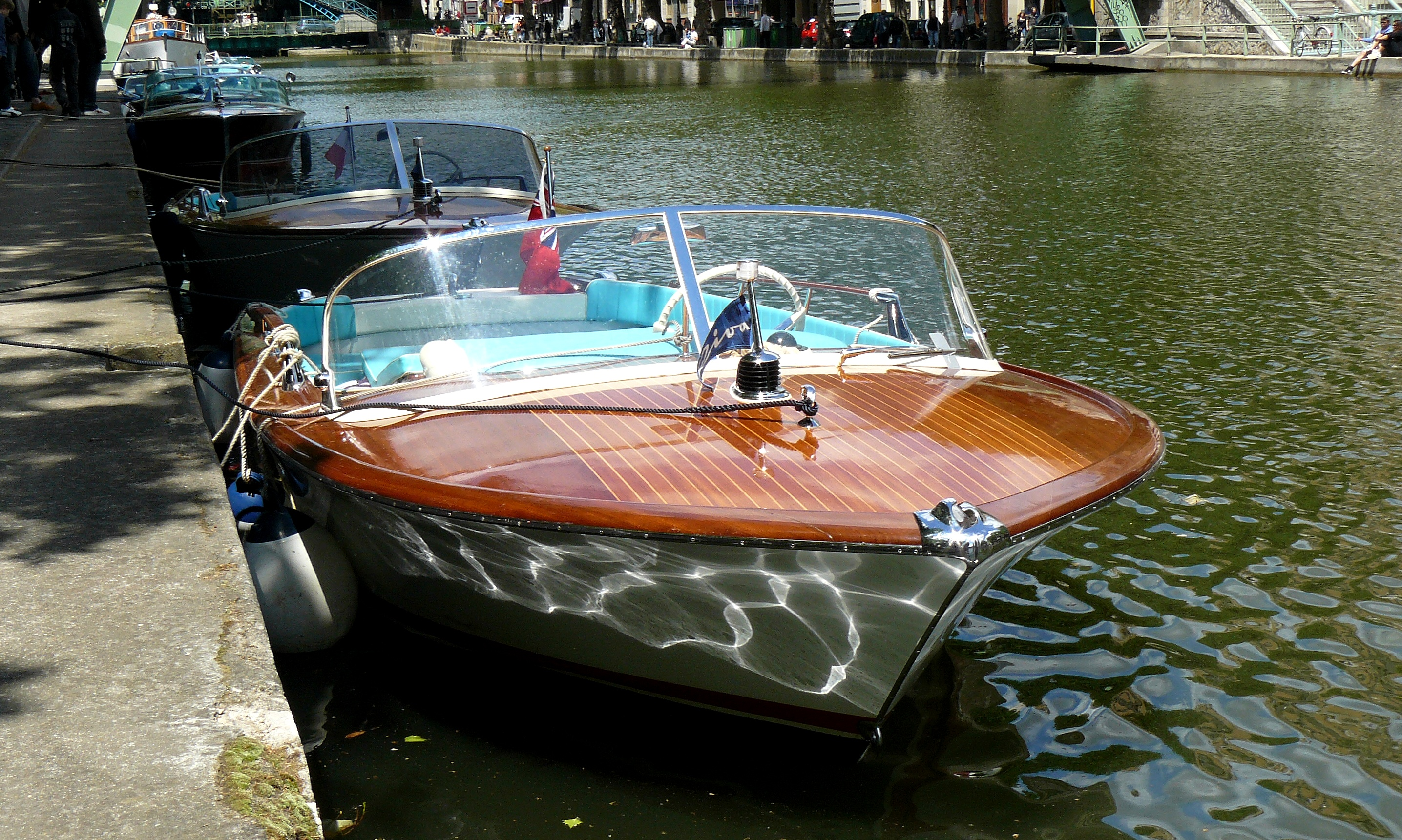 Un cnot "Riva junior" amaré canal Saint-Martin à Paris